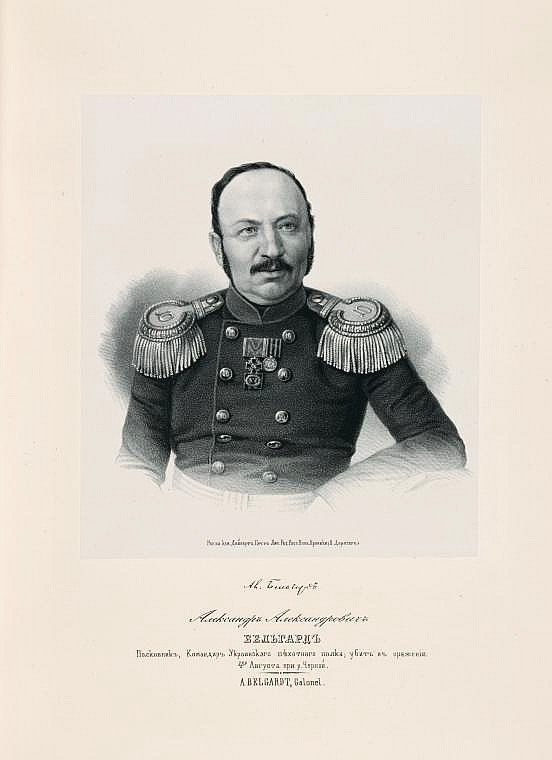 Бельгард Александр Александрович